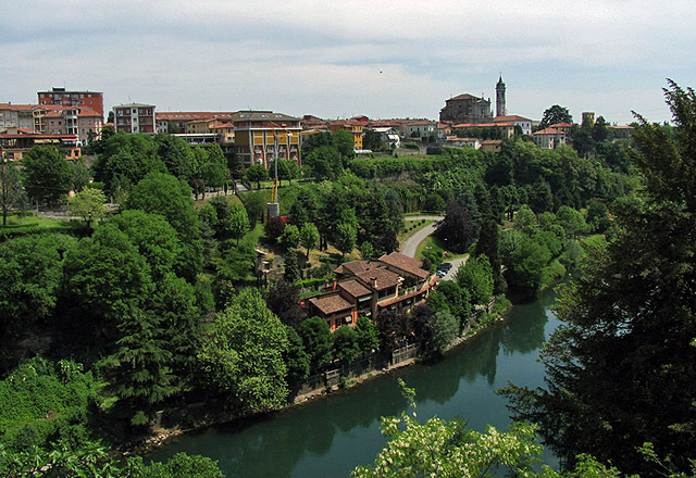 Capriate 05/2006